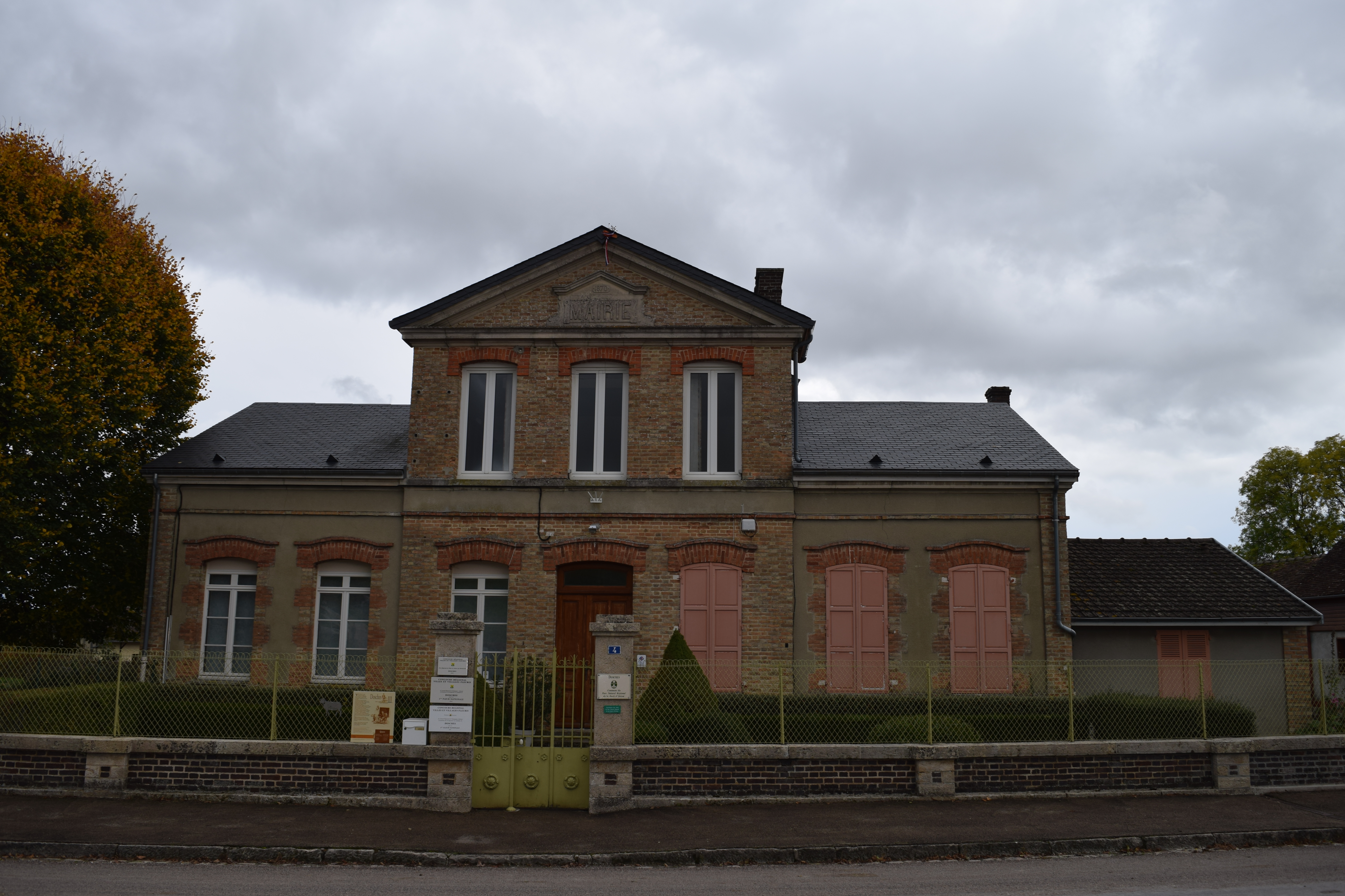 Mairie de Dosches